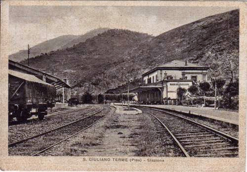 Vecchia cartolina della stazione di San Giuliano terme